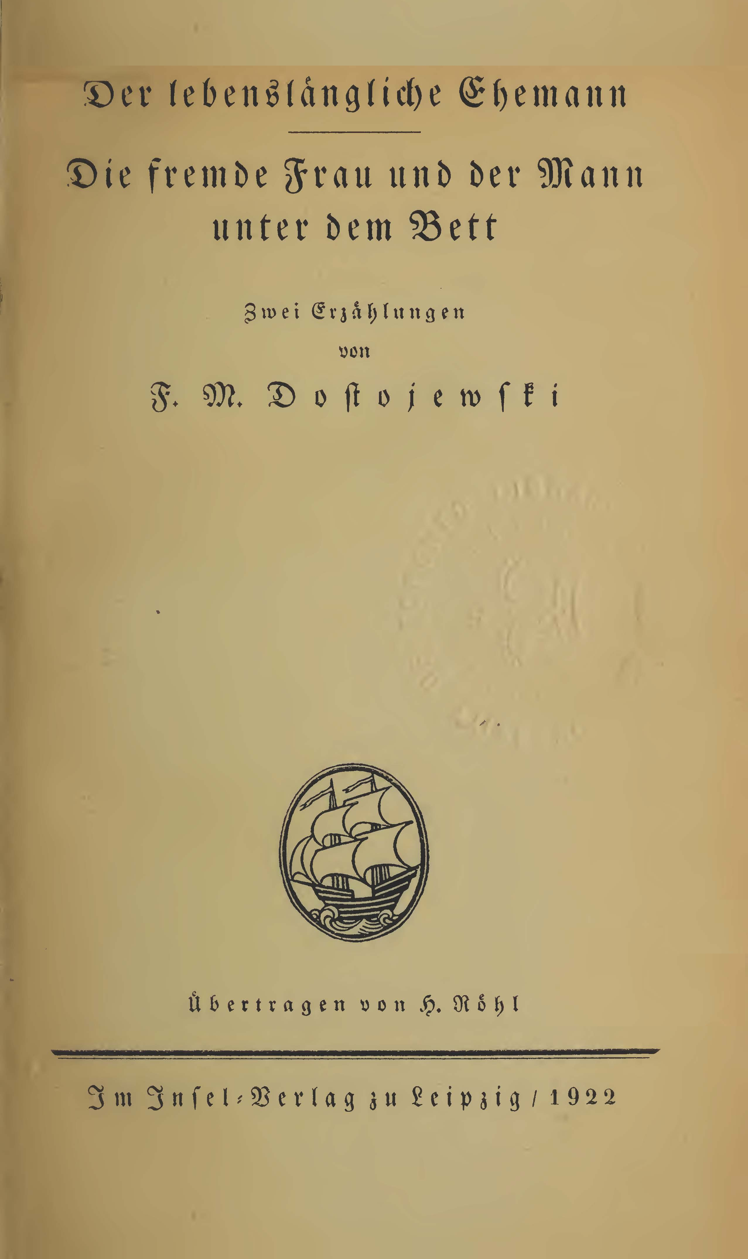 Titelblatt von Dostojewski: Die fremde Frau und der Mann unter dem Bett. Leipzig 1922.